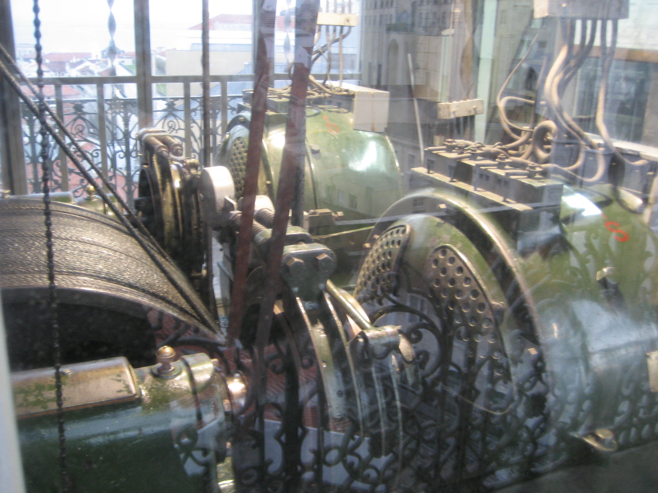 Engines of Elevador de Santa Justa. Lisboa